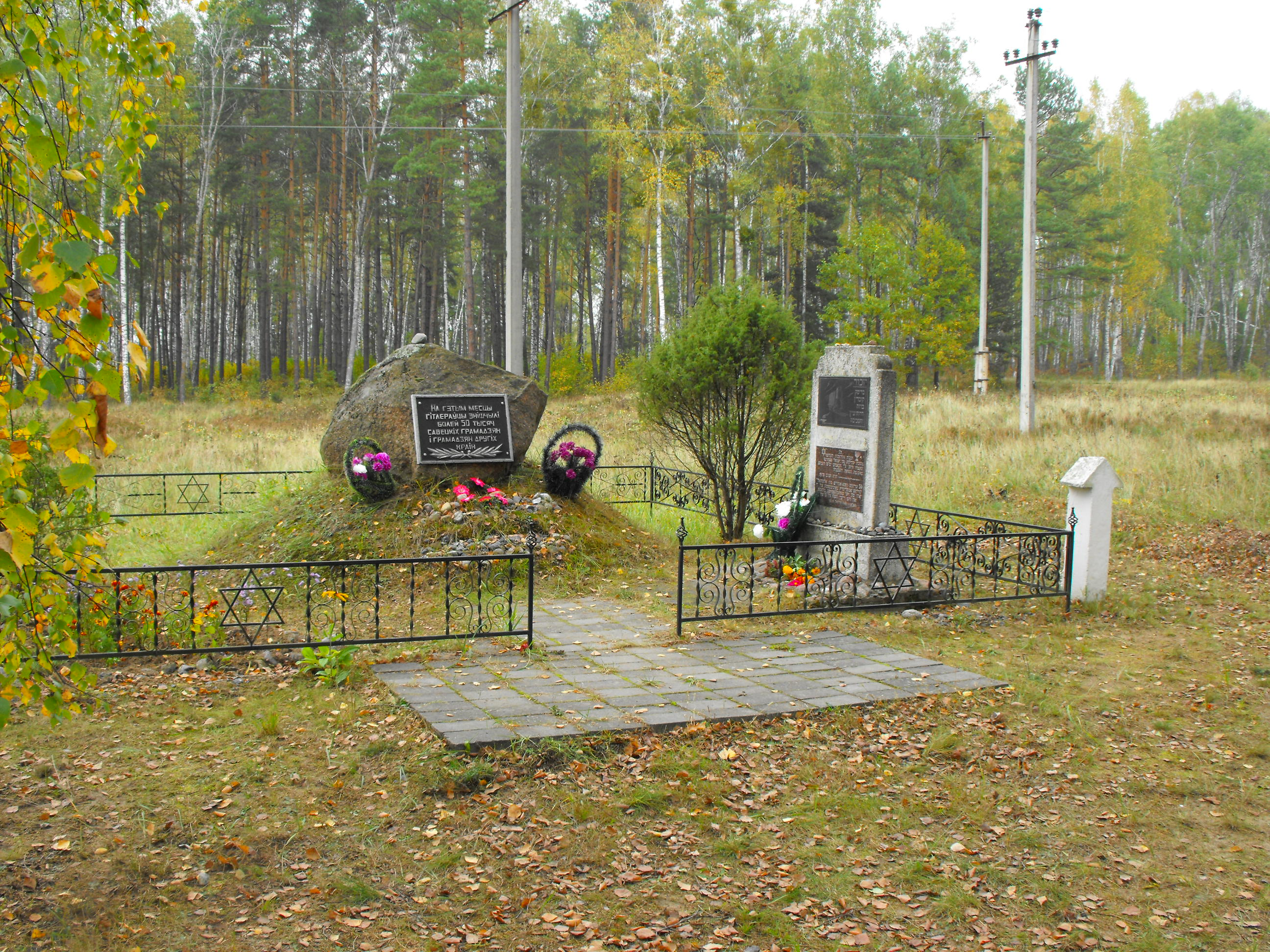 Бронная Гора. Памятник на месте массовых убийств евреев во время Холокоста.